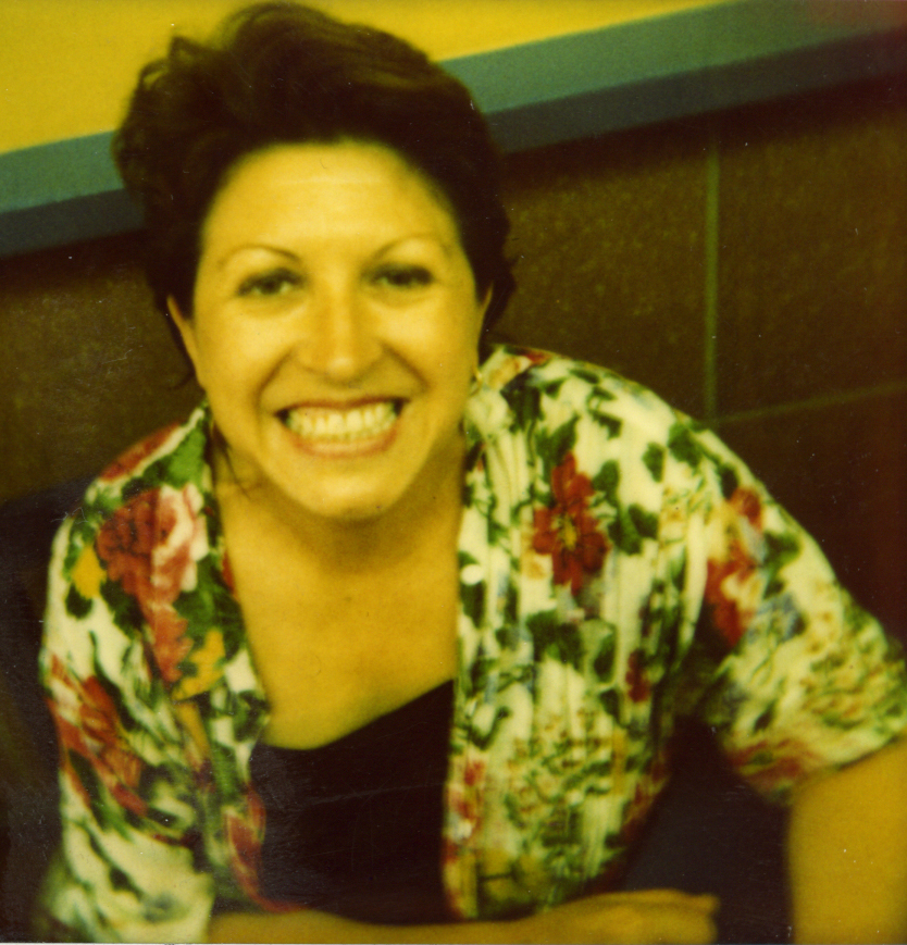 Retrato Polaroid de Luisa Rojo Gayán